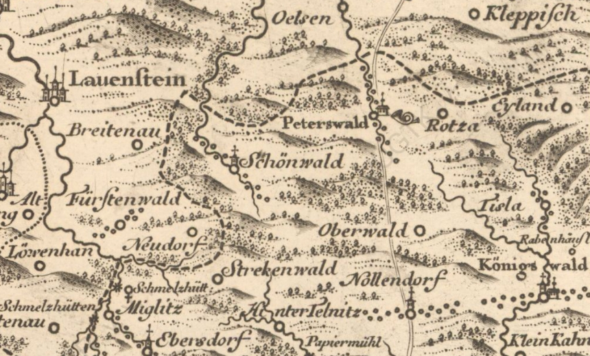 Petrovicko v Krušných horách na Müllerově mapě Čech z roku 1720.